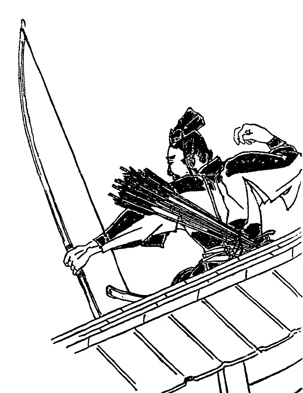 安倍宗任、平安時代後期の武将。／江戸時代『前賢故実』より。画：菊池容斎